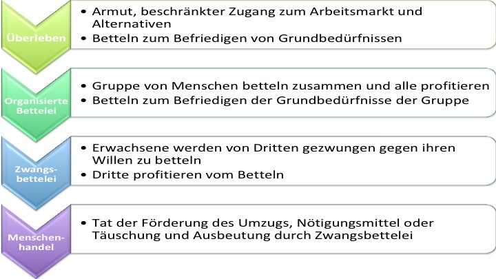 Einordnung der Zwangsbettelei